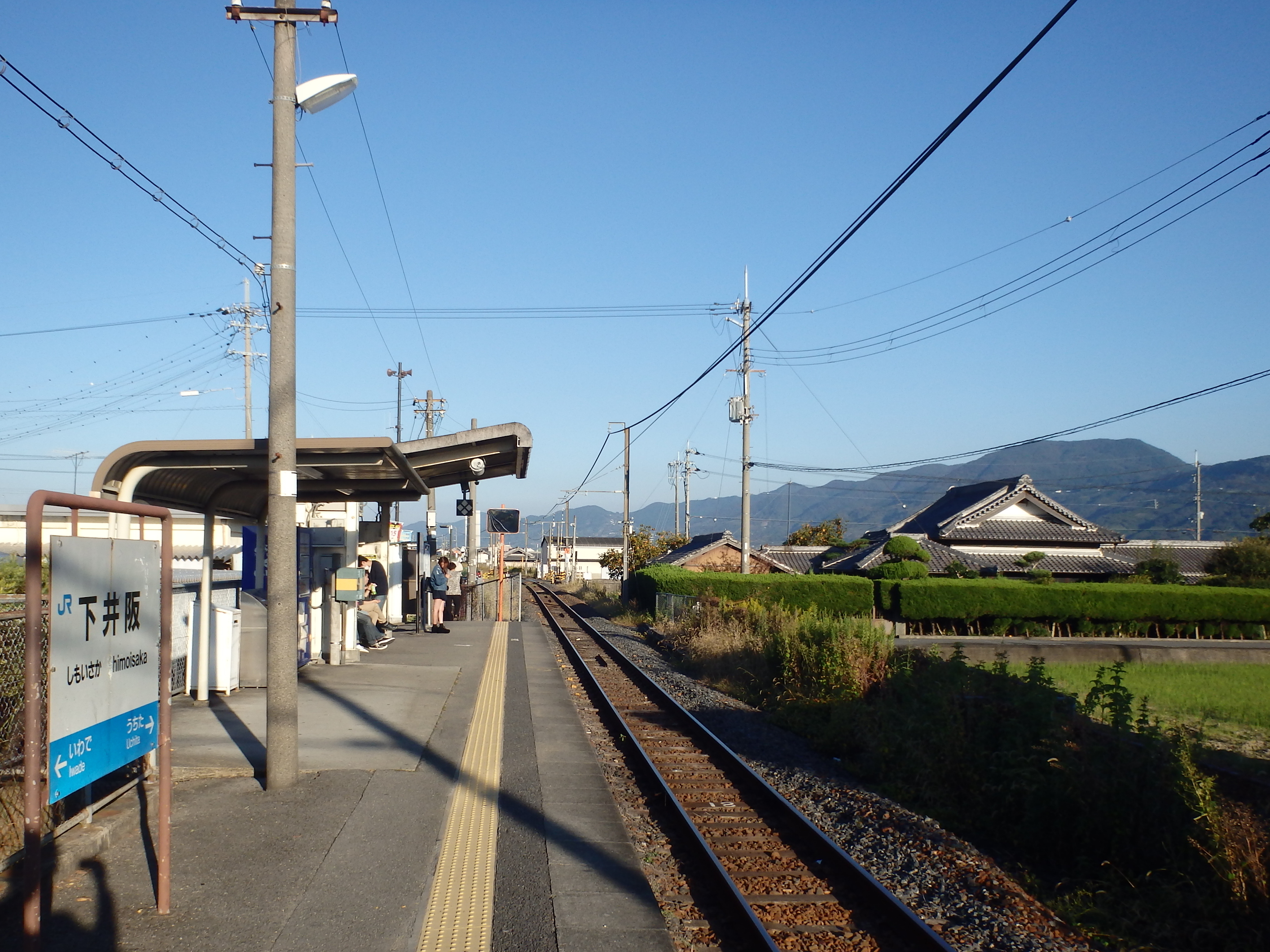 下井阪駅ホーム